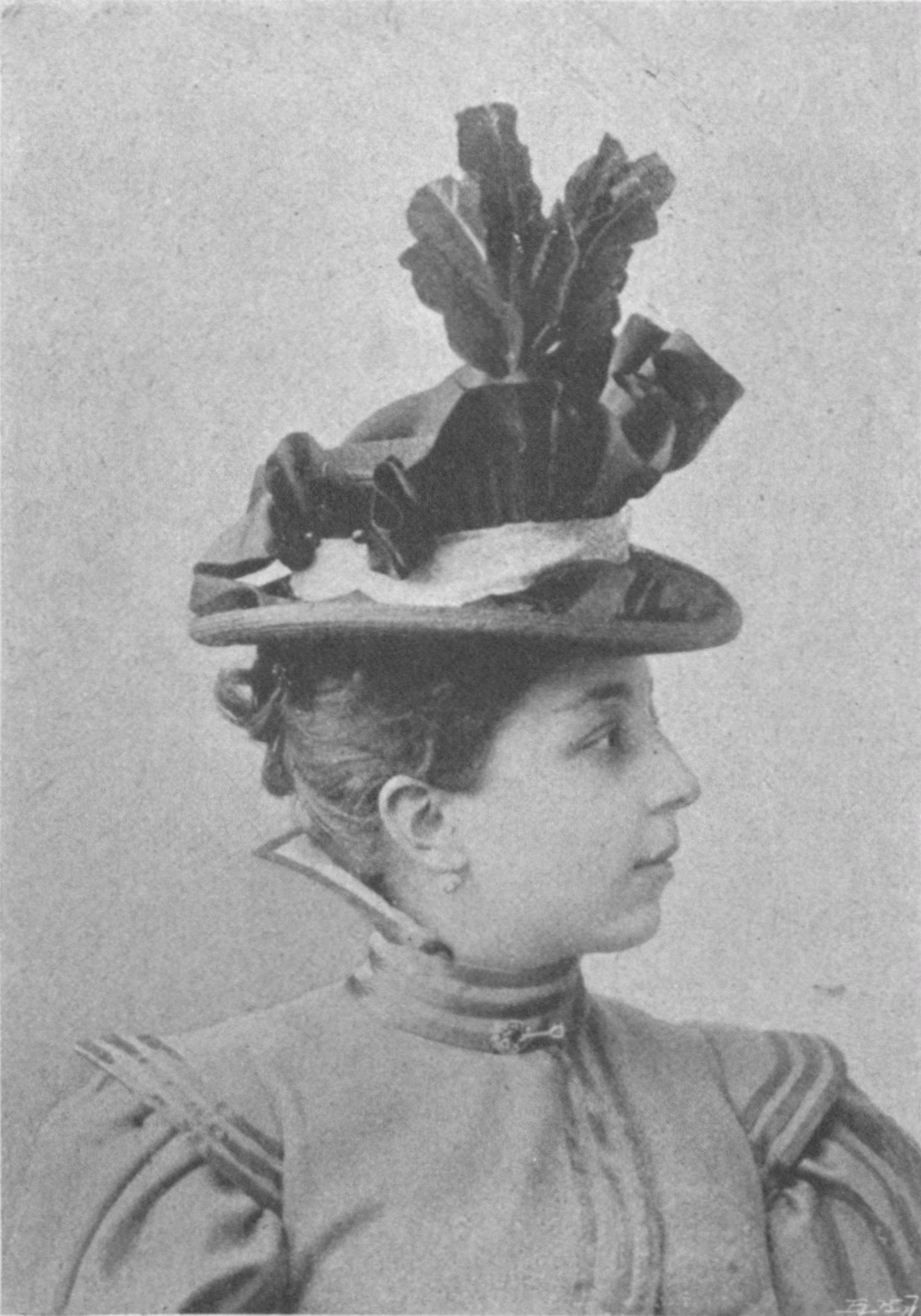 Elsa Pleßner (Elsa Ginsberg; 22 August 1877 Vienna[1] — 1 May 1932 Alicante), Austrian writer